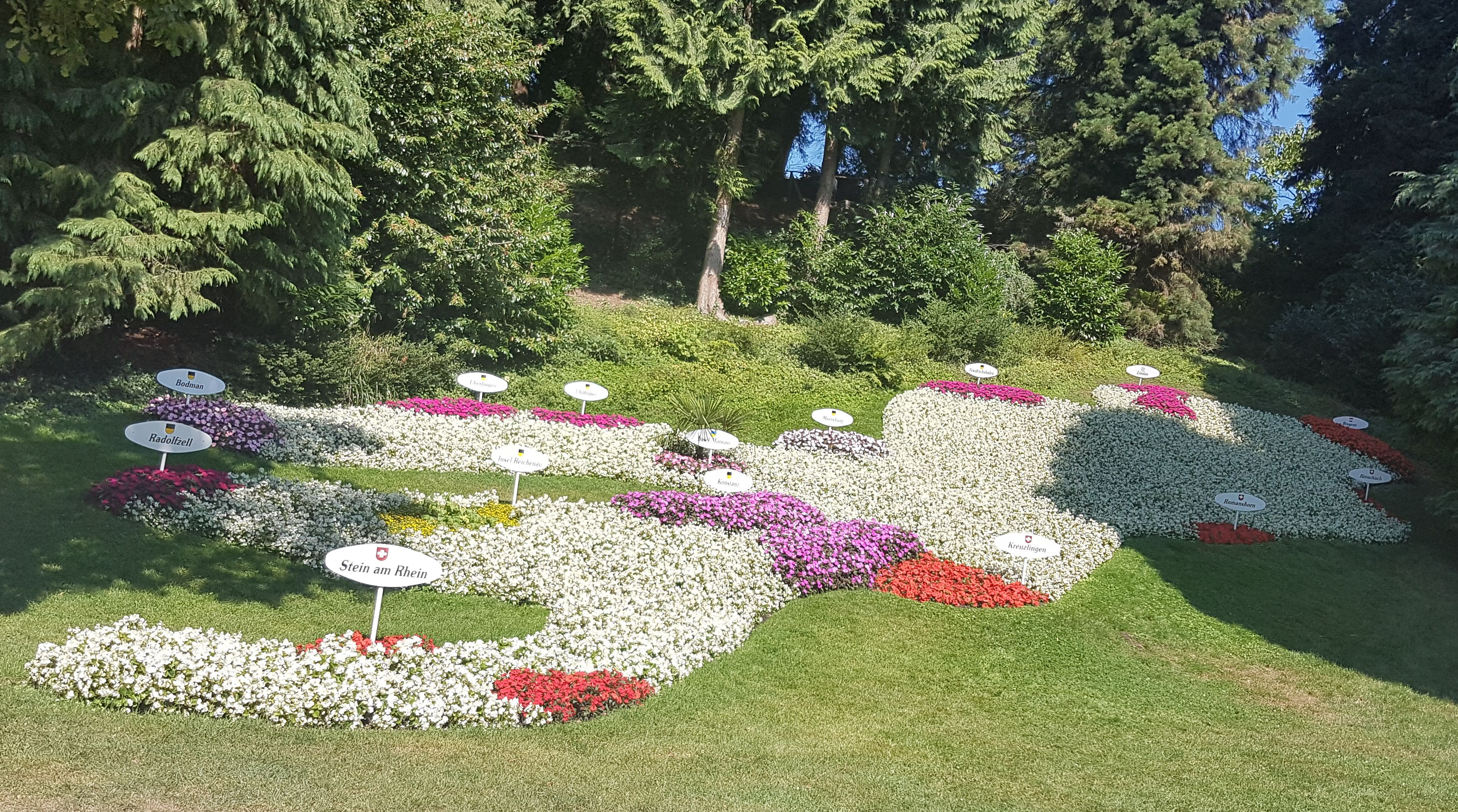 Das Bodenseerelief ist ein Blumenbeet auf Insel Mainau, das in Form des Bodensees gestaltet ist.